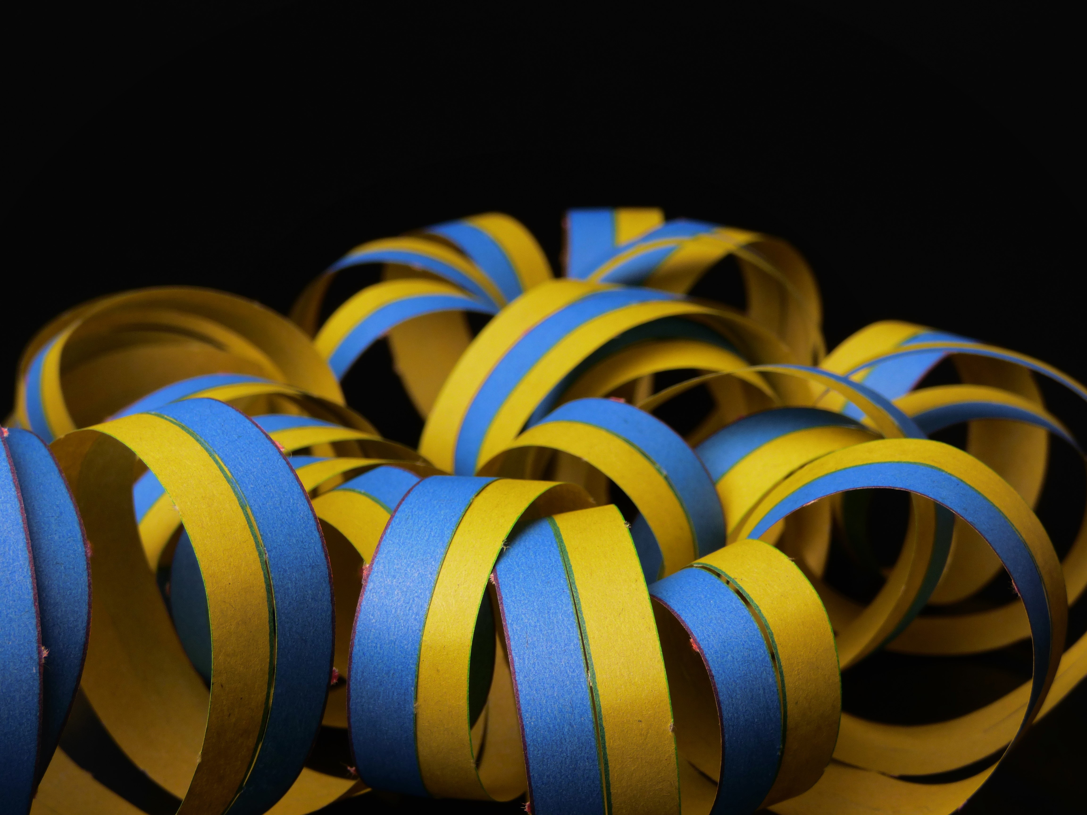 Luftschlange